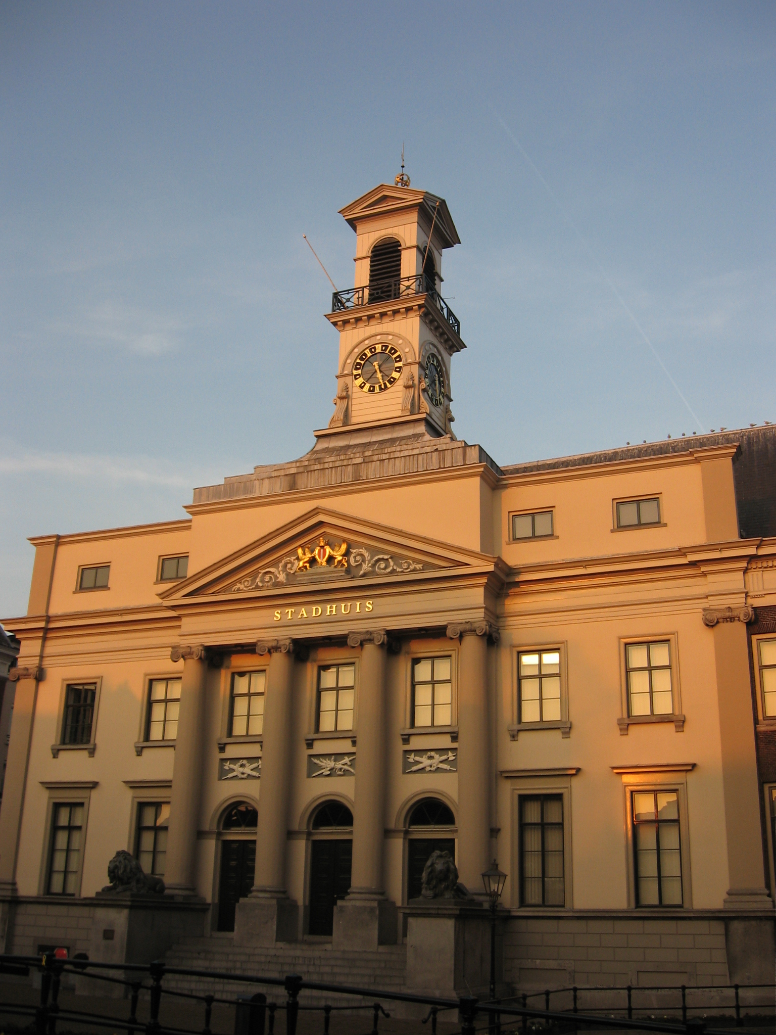 Zicht op het Stadhuis van Dordrecht gevestigd aan het Stadhuisplein 1 in het centrum van Dordrecht